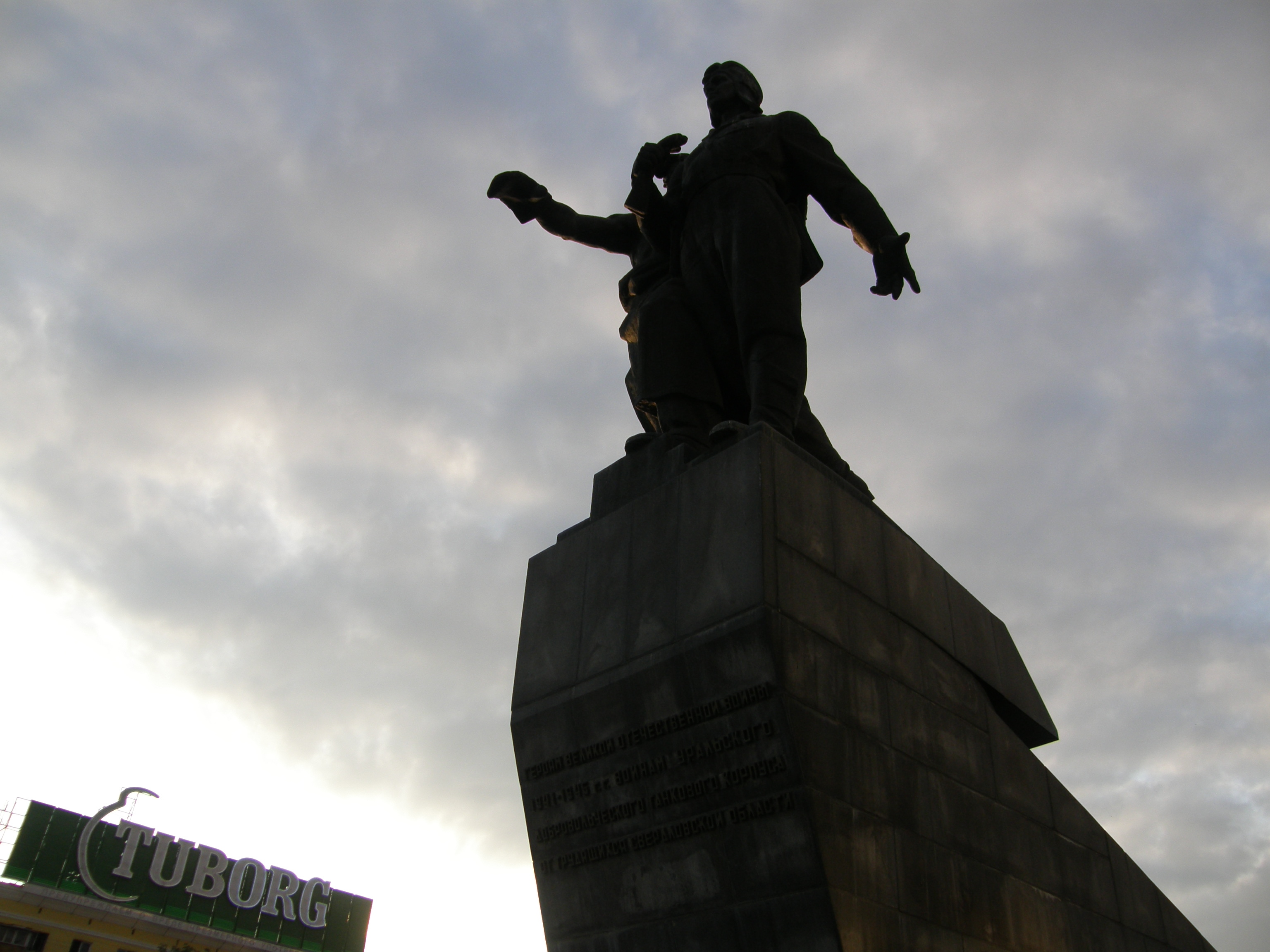 "под варежкой"